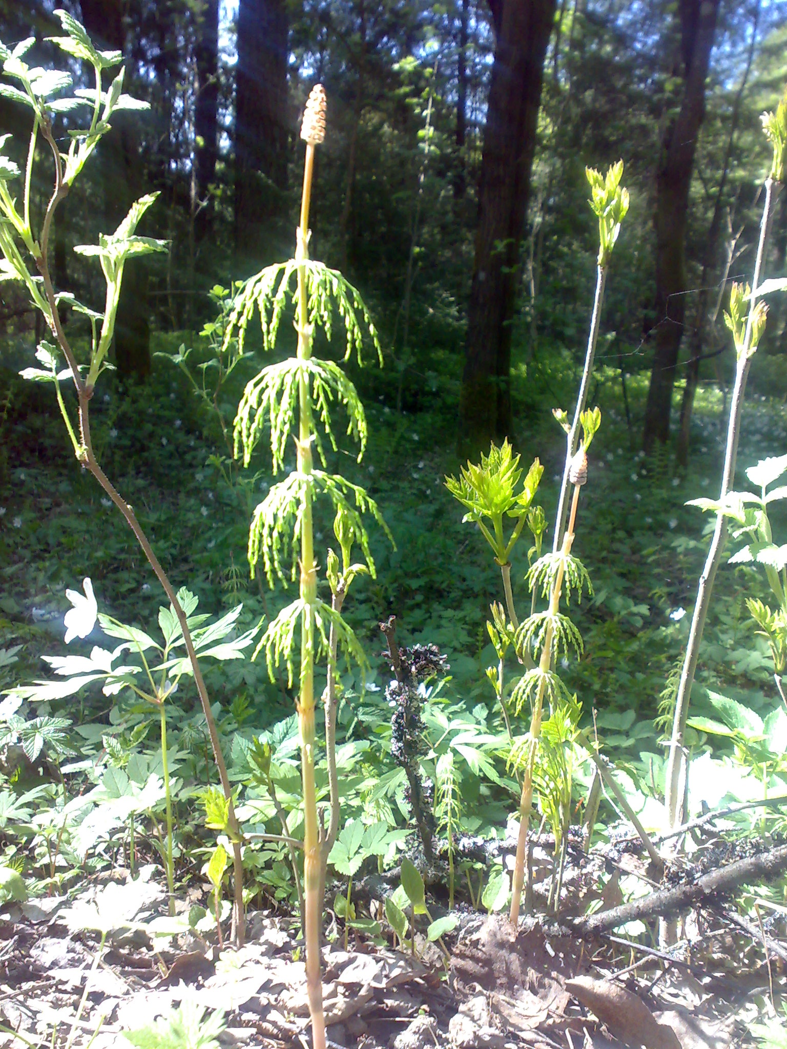 Equisetum sylvaticum Skogsnelle Oslo Norway